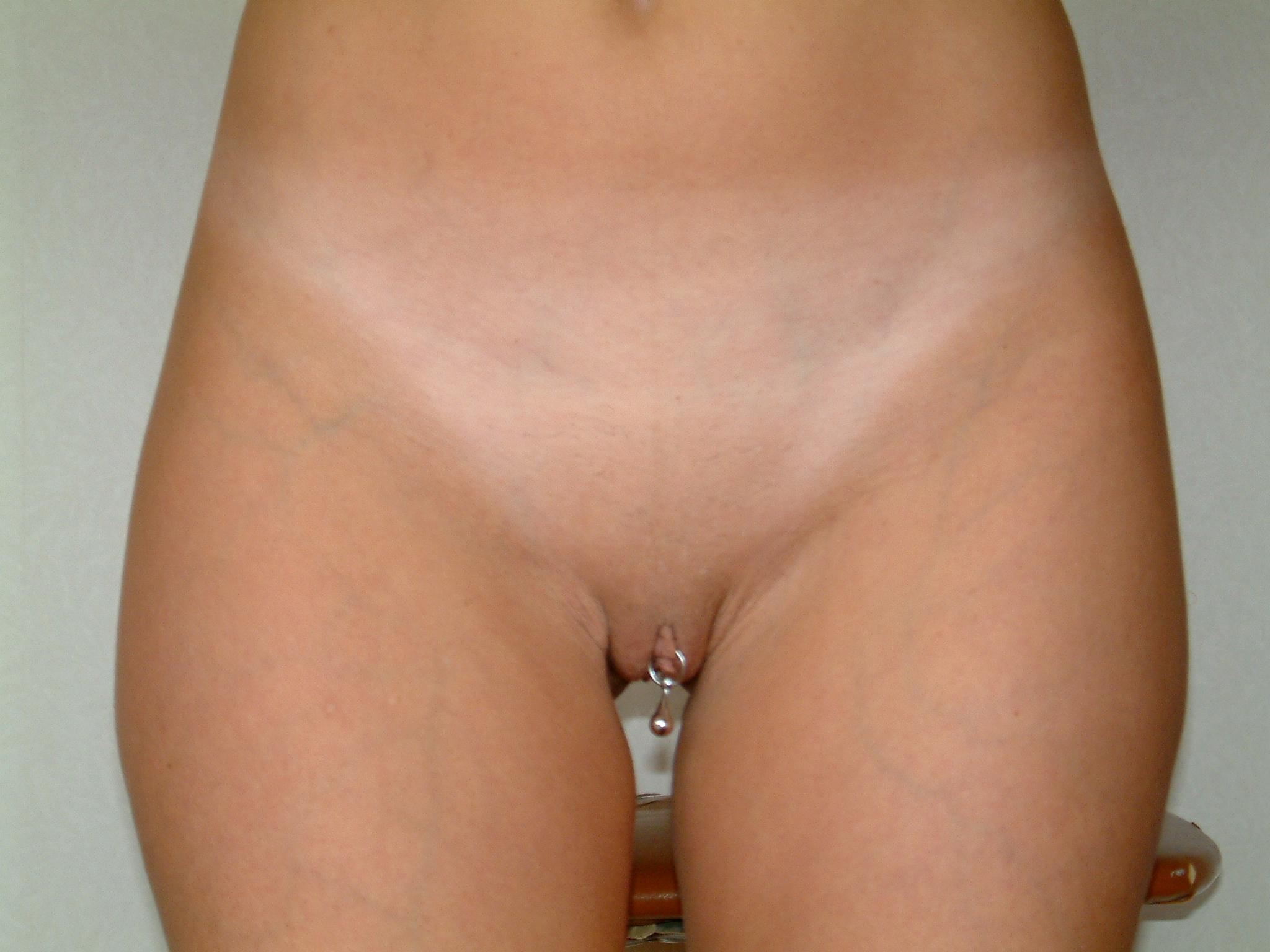 Lynseys clit piercing